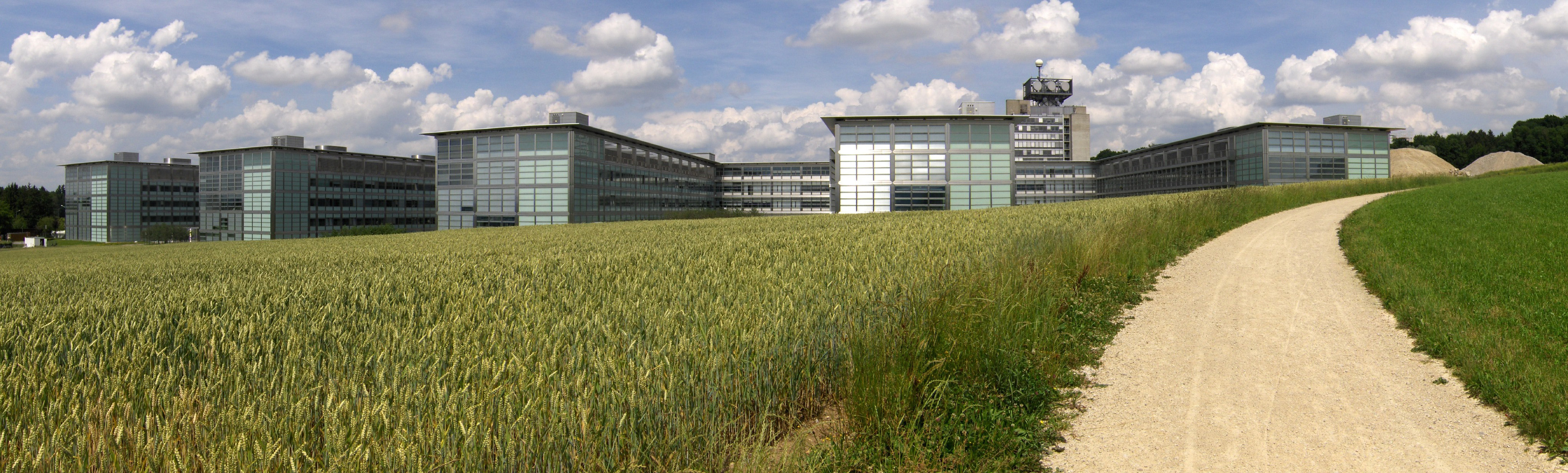 ETH Hönggerberg Frontansicht